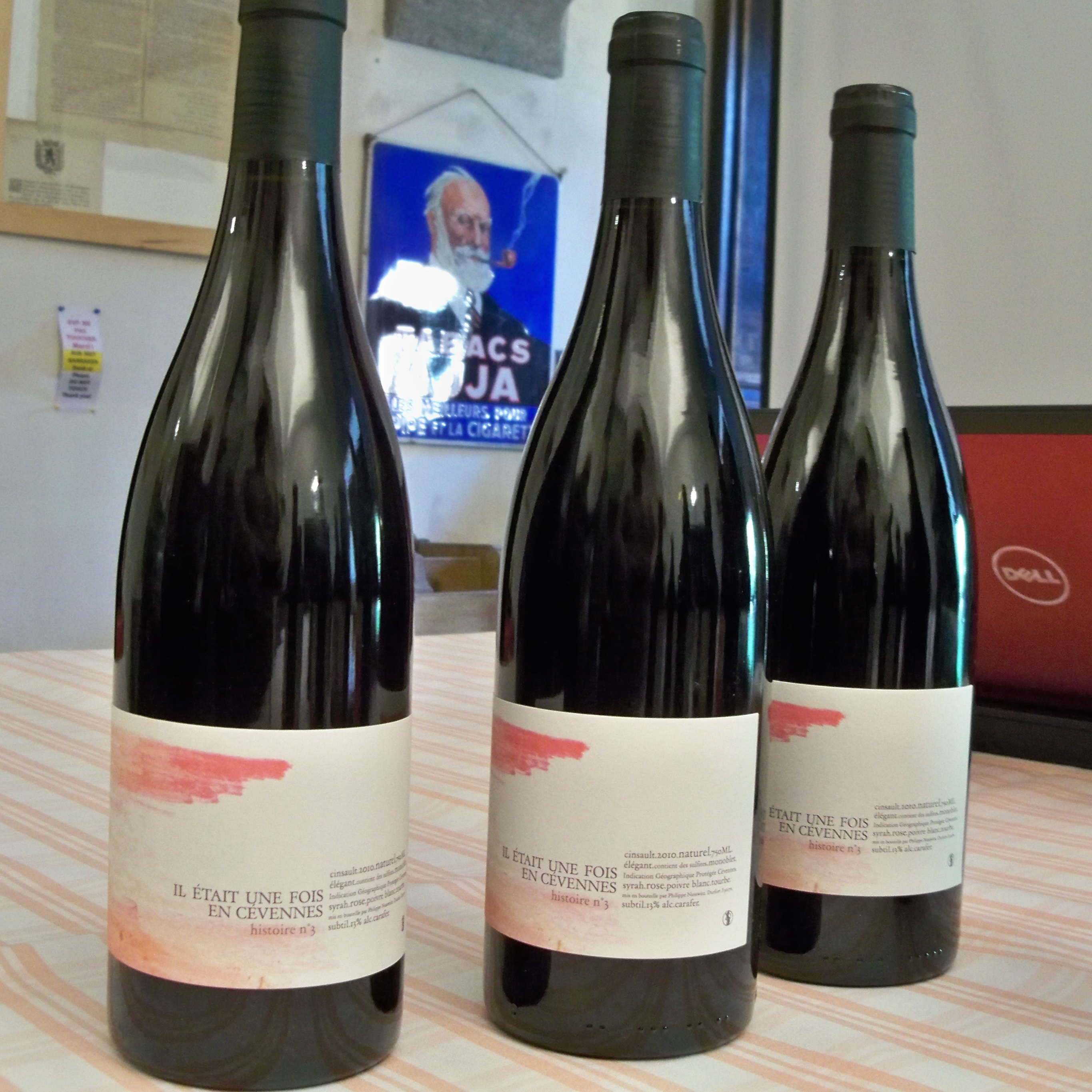 Trois bouteilles de vin de Pays des Cévennes à la Conférence sur le vin de la vallée du Rhône méridionale, à la ferme castrale d'Hermalle-sous-Huy.